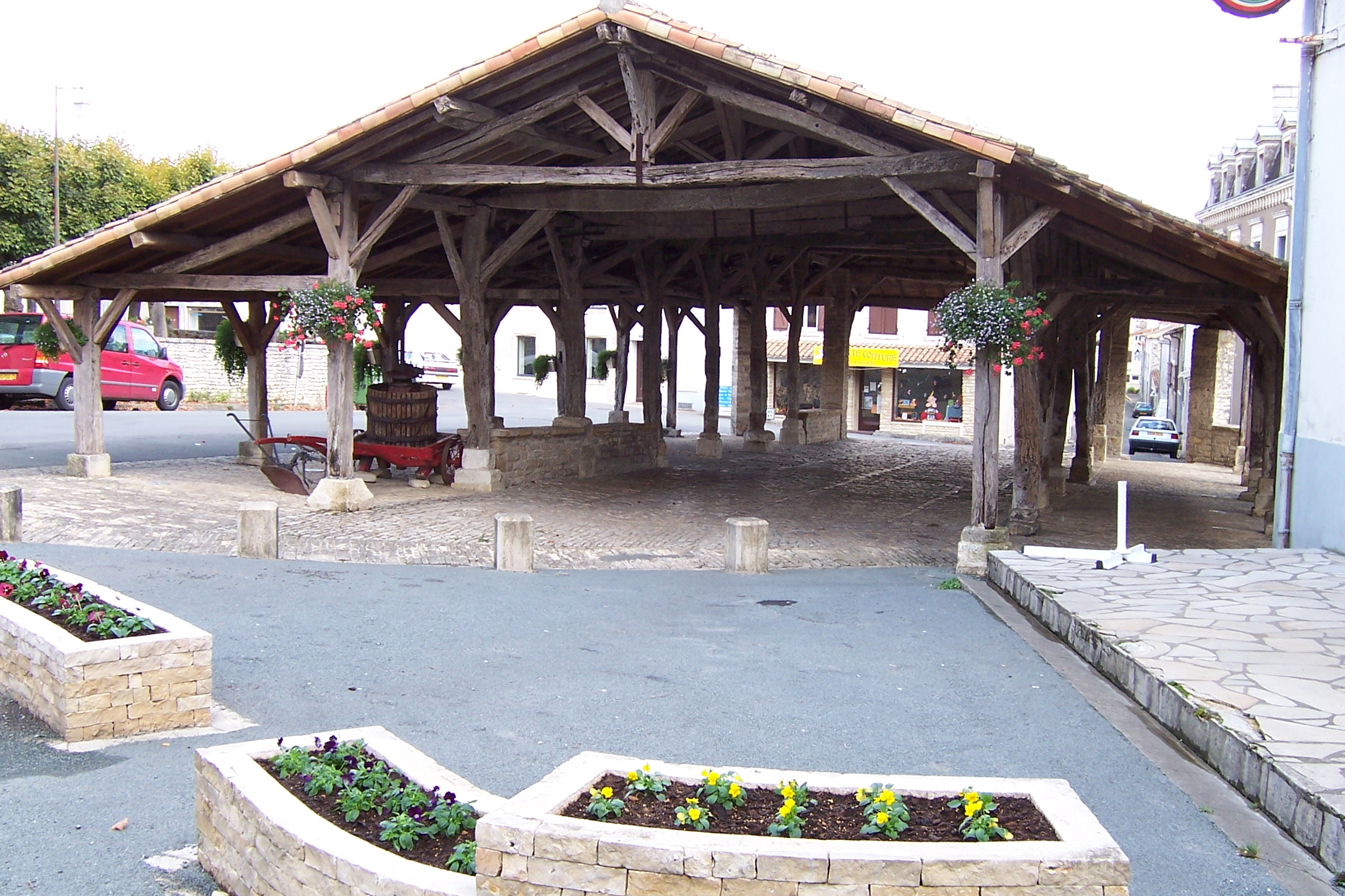 France - Deux-Sèvres - Pamproux - La Halle